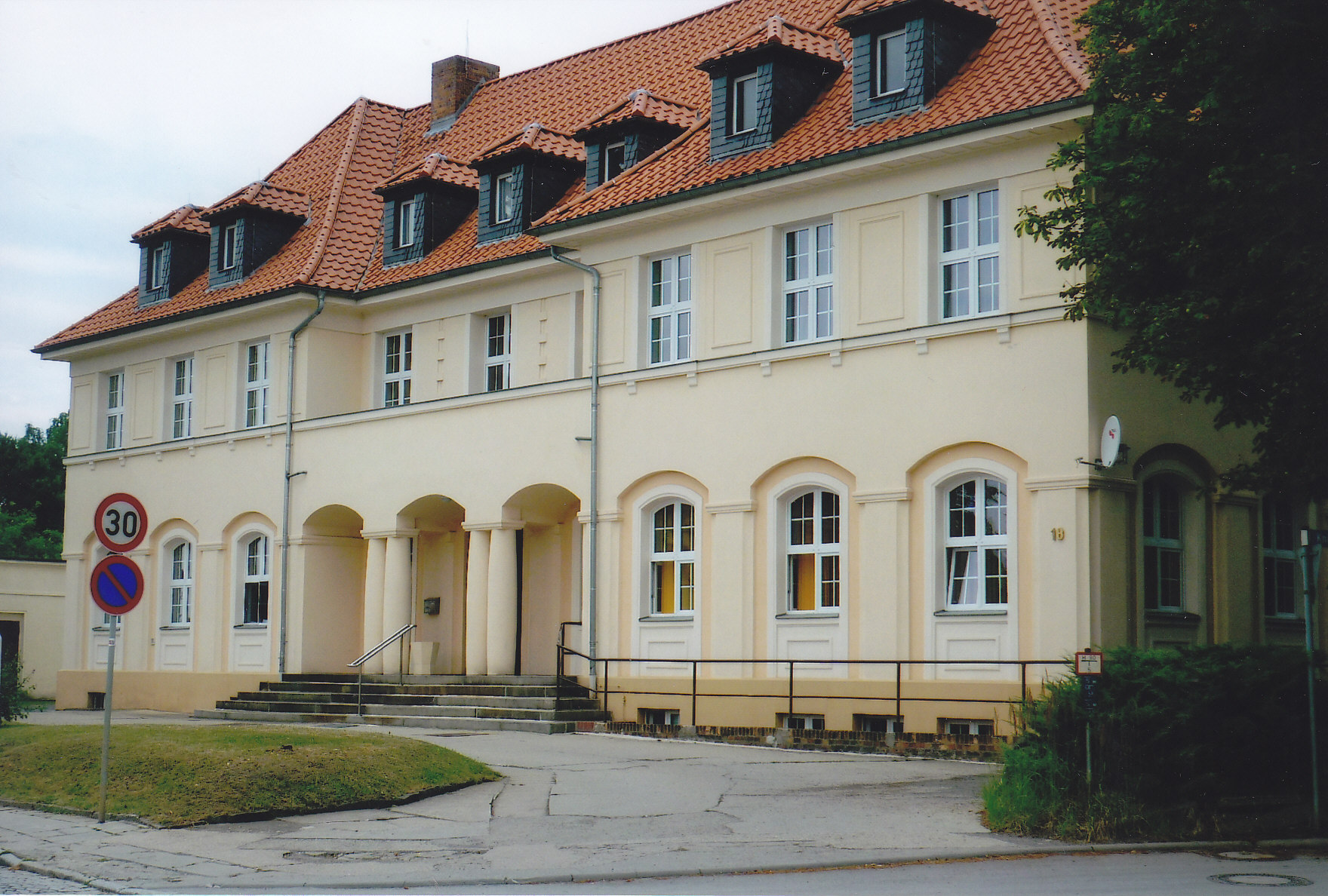 Ehemalige Private Oberschule in Lauchhammer, Schüler 1941-1945. Heutige Nutzung als Ärztehaus